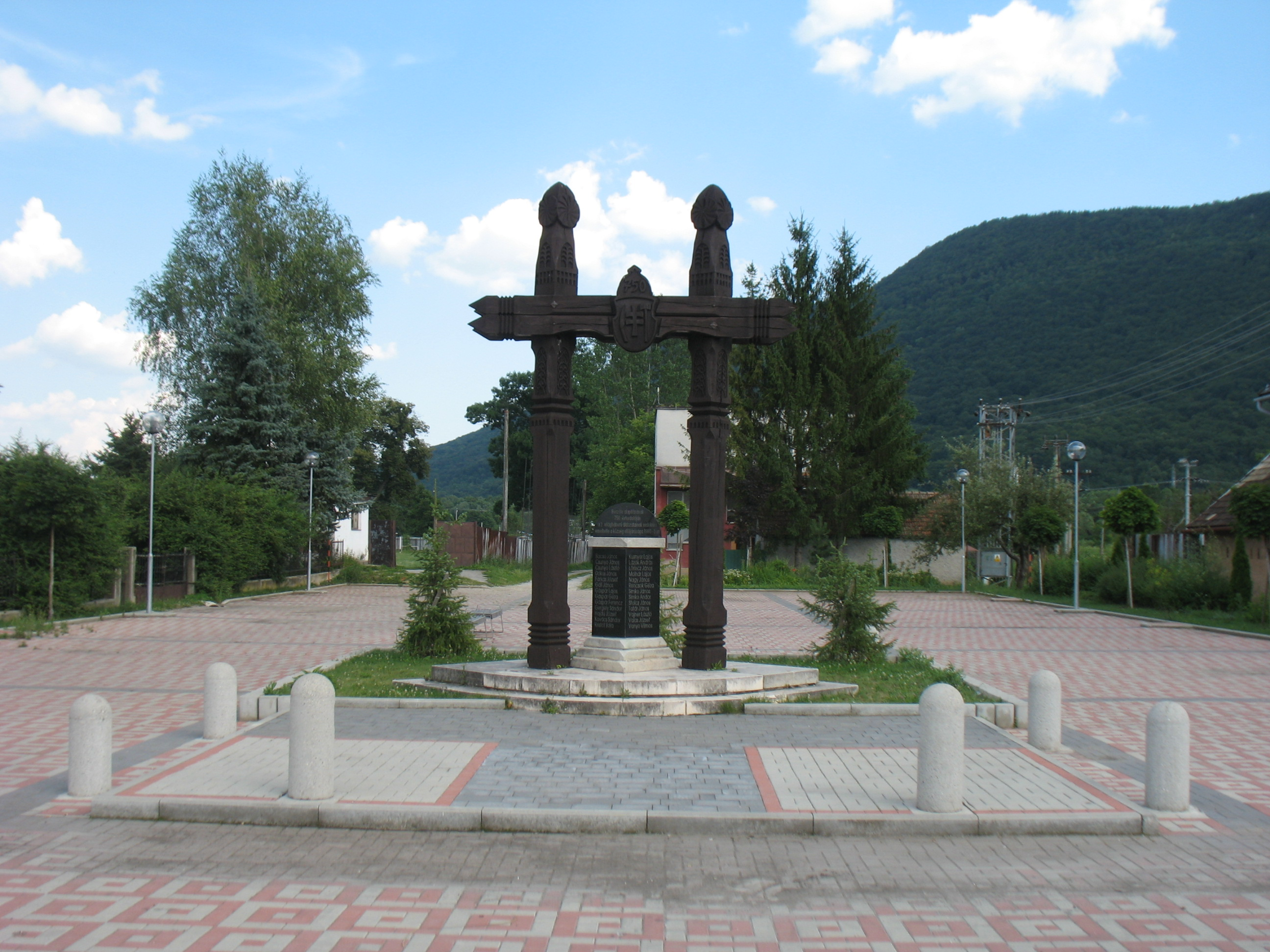 Berzéte